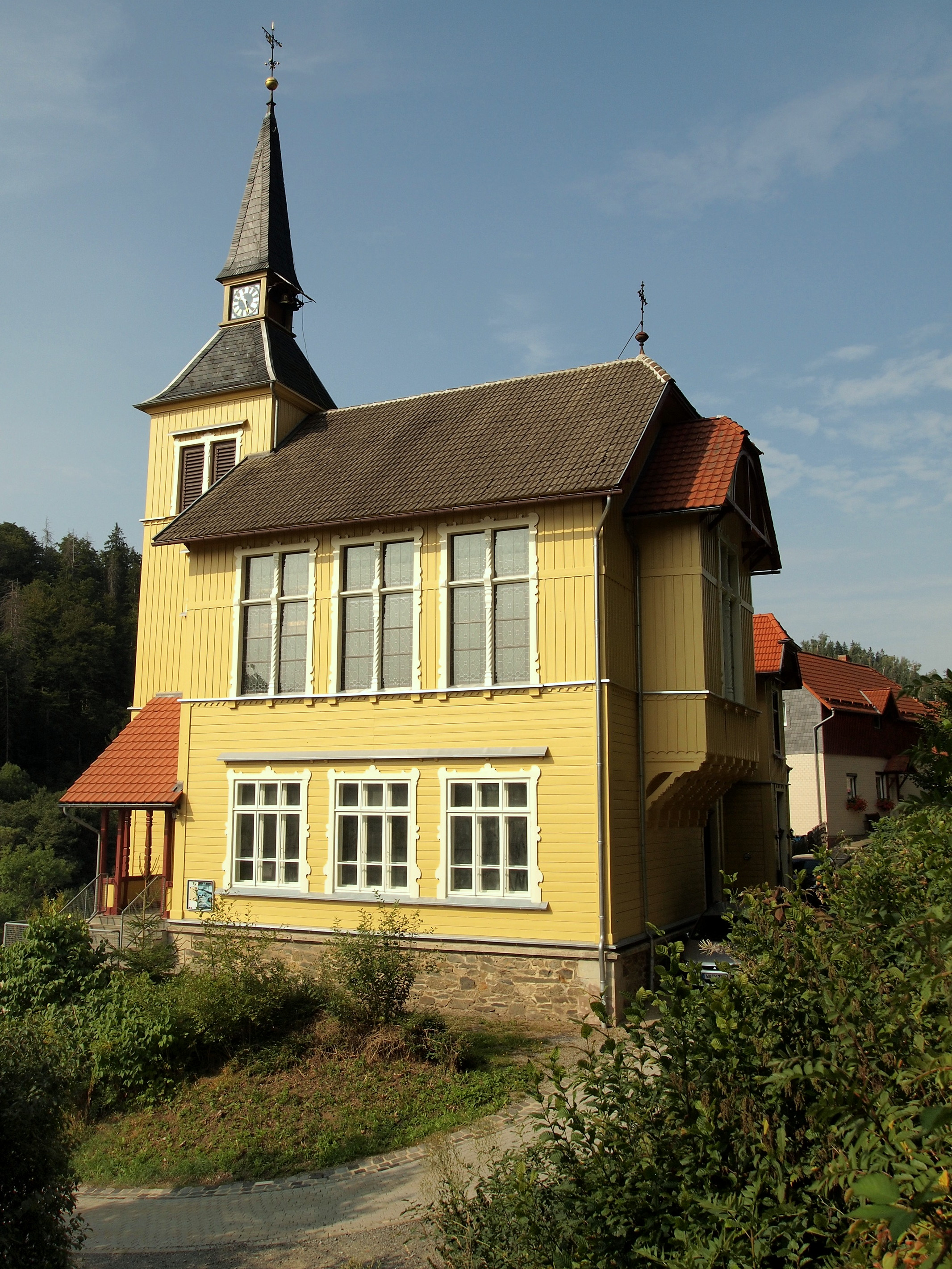 Kirche in Altenbrak, Landkreis Harz, Sachsen-Anhalt